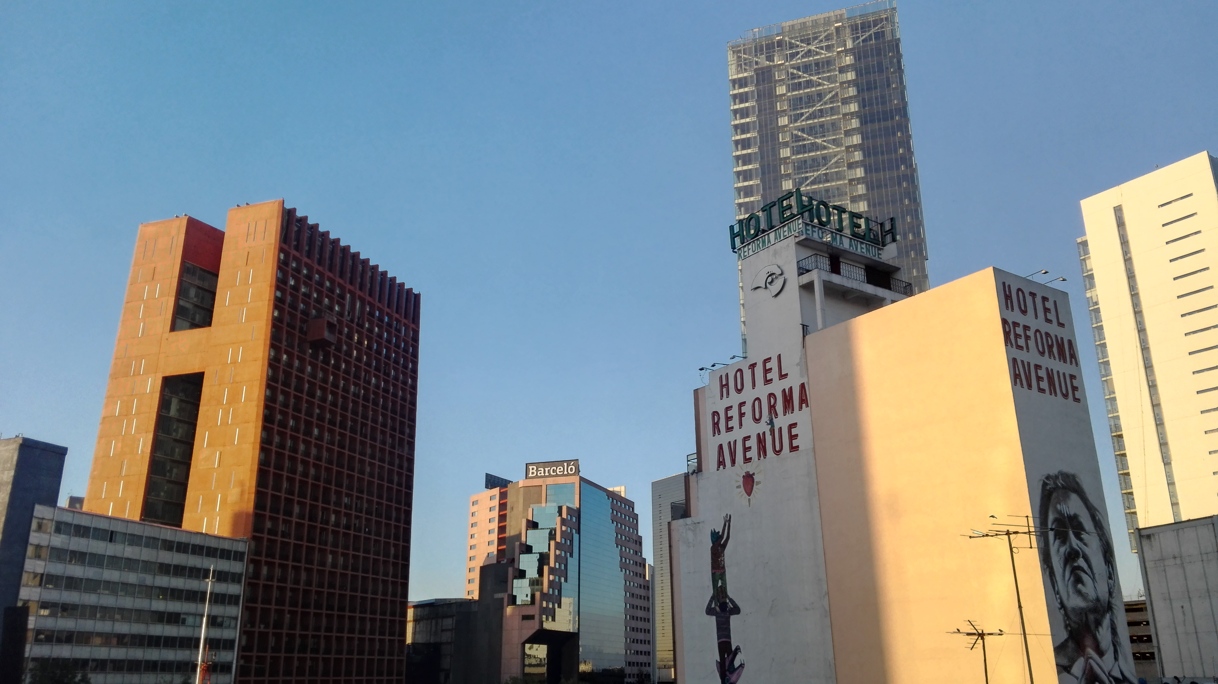 Hoteles y edificios de oficinas en la colonia Juárez